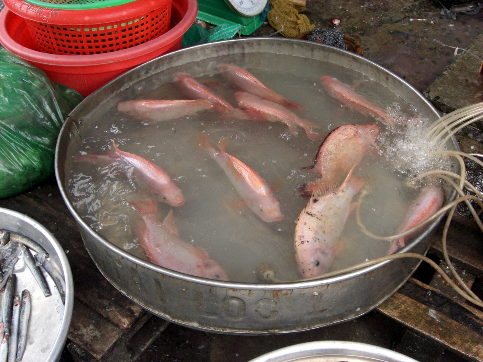 Poissons vivants au marché de Ho Chi Minh